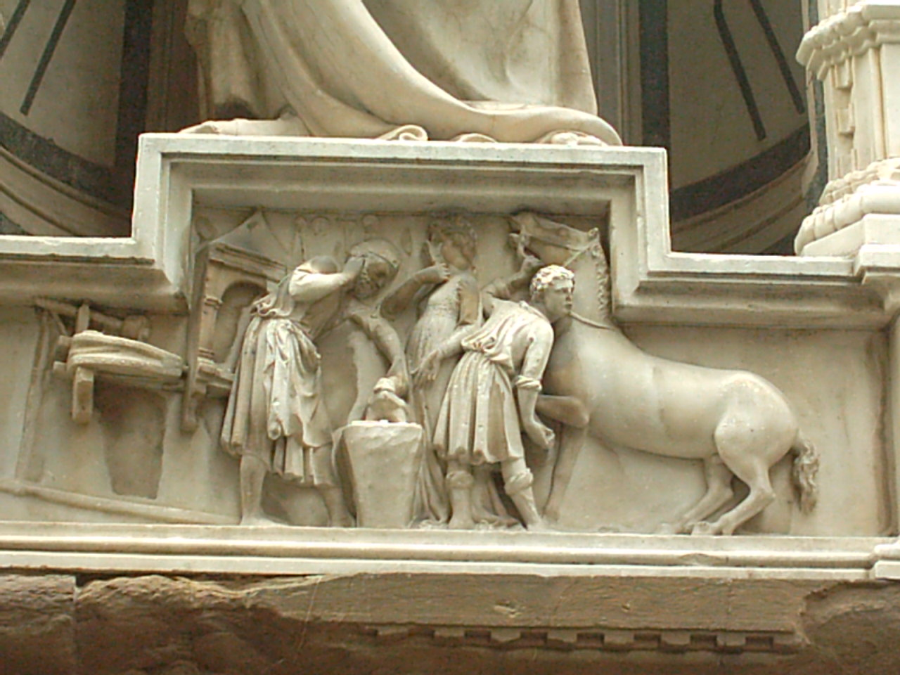 Bassorilievo rappresentante la ferratura dei cavalli su un tabernacolo (= nicchia esterna) della chiesa di Orsanmichele a Firenze.